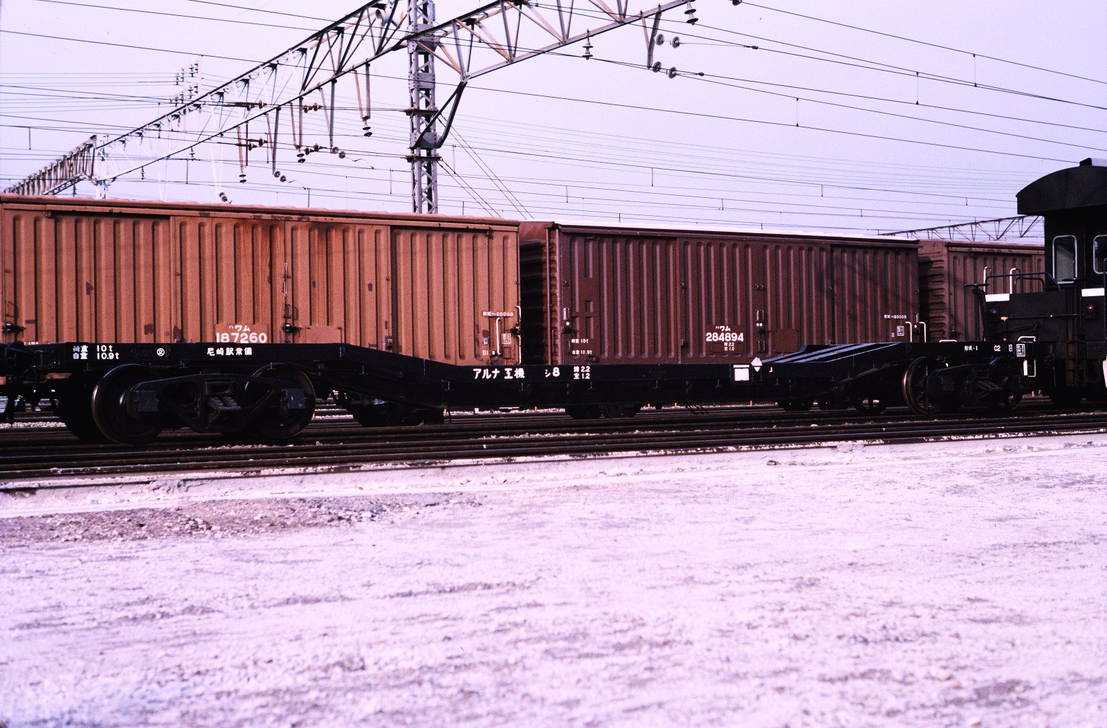 尼崎駅にてアルナ工機所有の国鉄私有貨車・シ1形式シ8